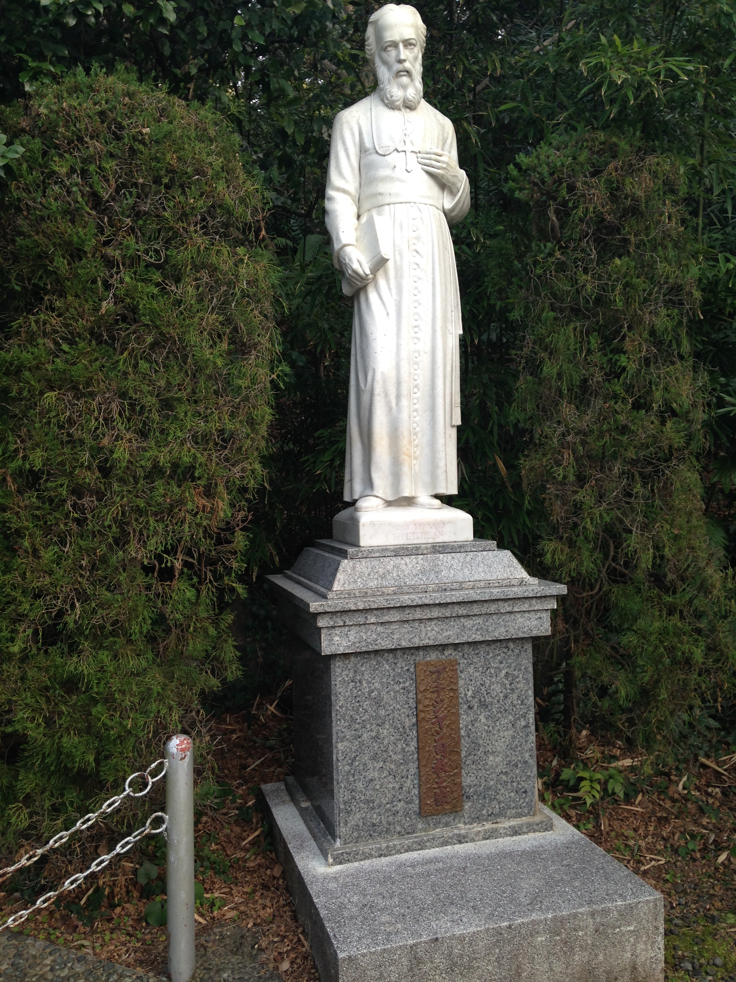 大浦天主堂近くにあるプチジャン司教之像